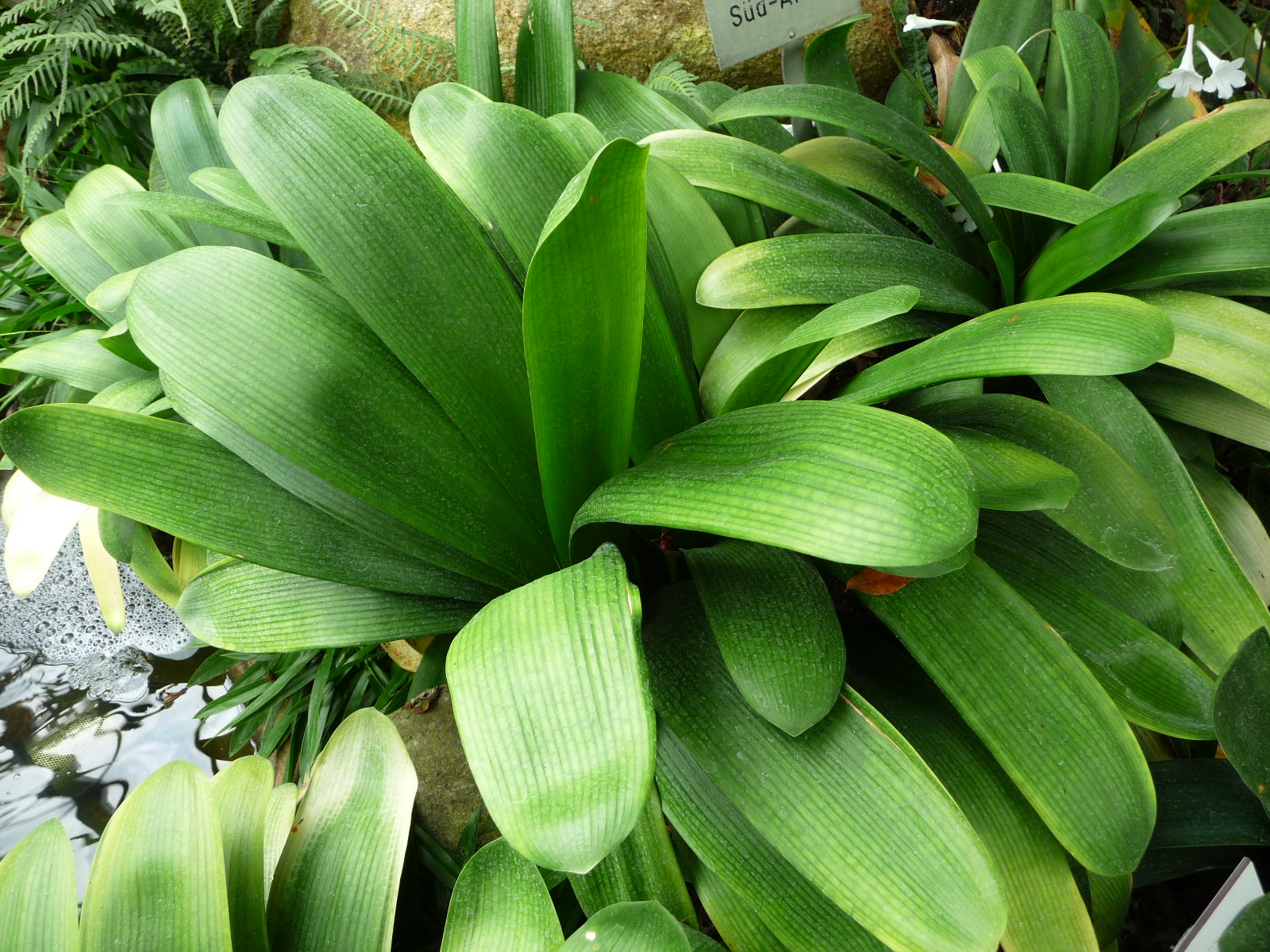 Clivia nobilis (Hamburgi pálmaház)